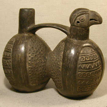 Pfeiftopf Chimu